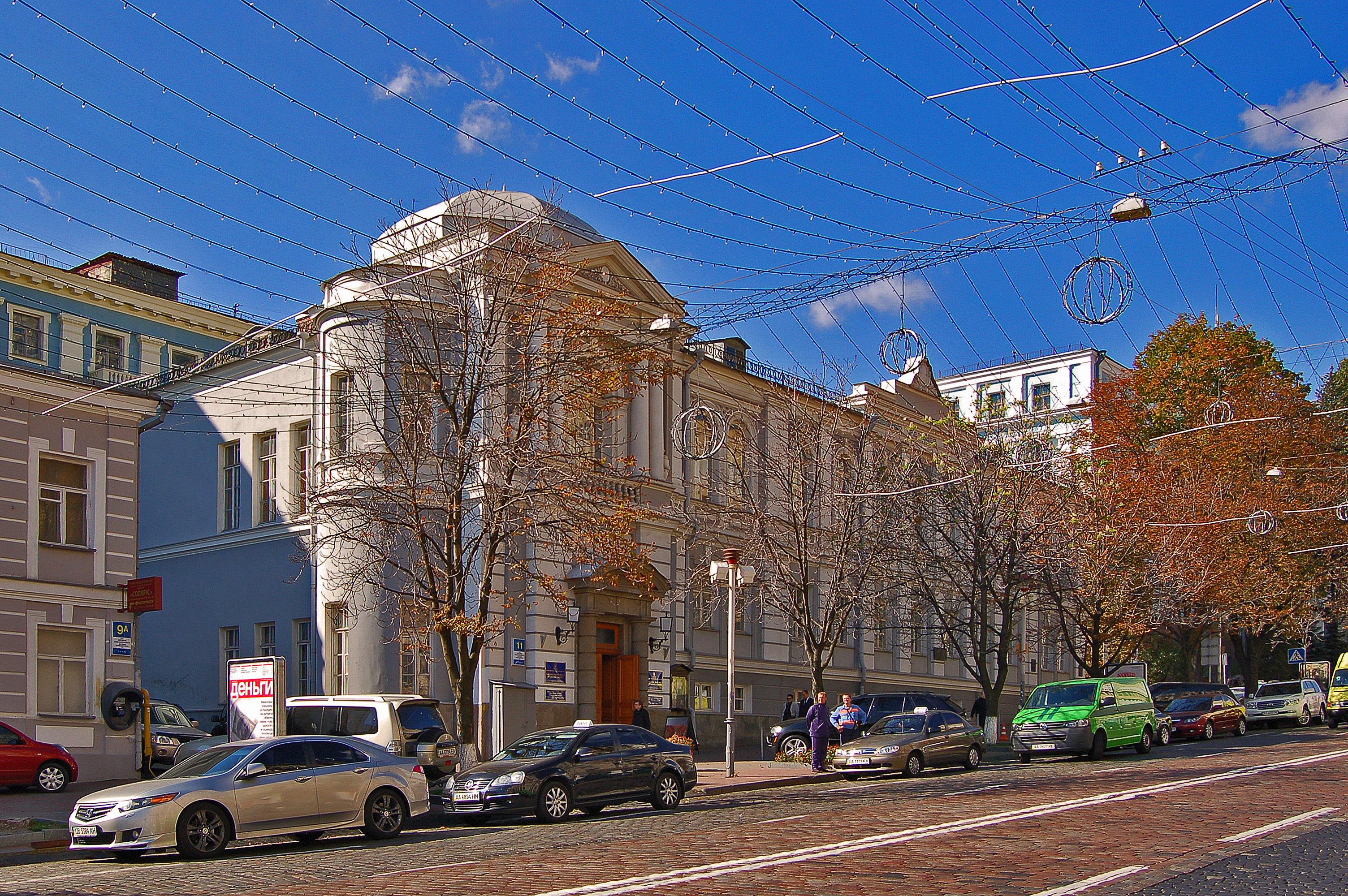 Дом № 11/1 по улице Богдана Хмельницкого в Киеве